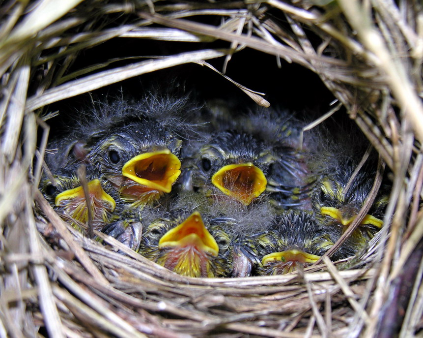 Šeši žaliosios pečialindos (Phylloscopus sibilatrix) jaunikliai lizde Šeima. Devynbalsiniai (Sylviidae) Foto: Algirdas, 2006 m. birželio 14 d.